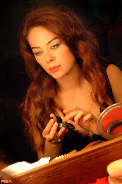 Actress :en:Demet Evgar